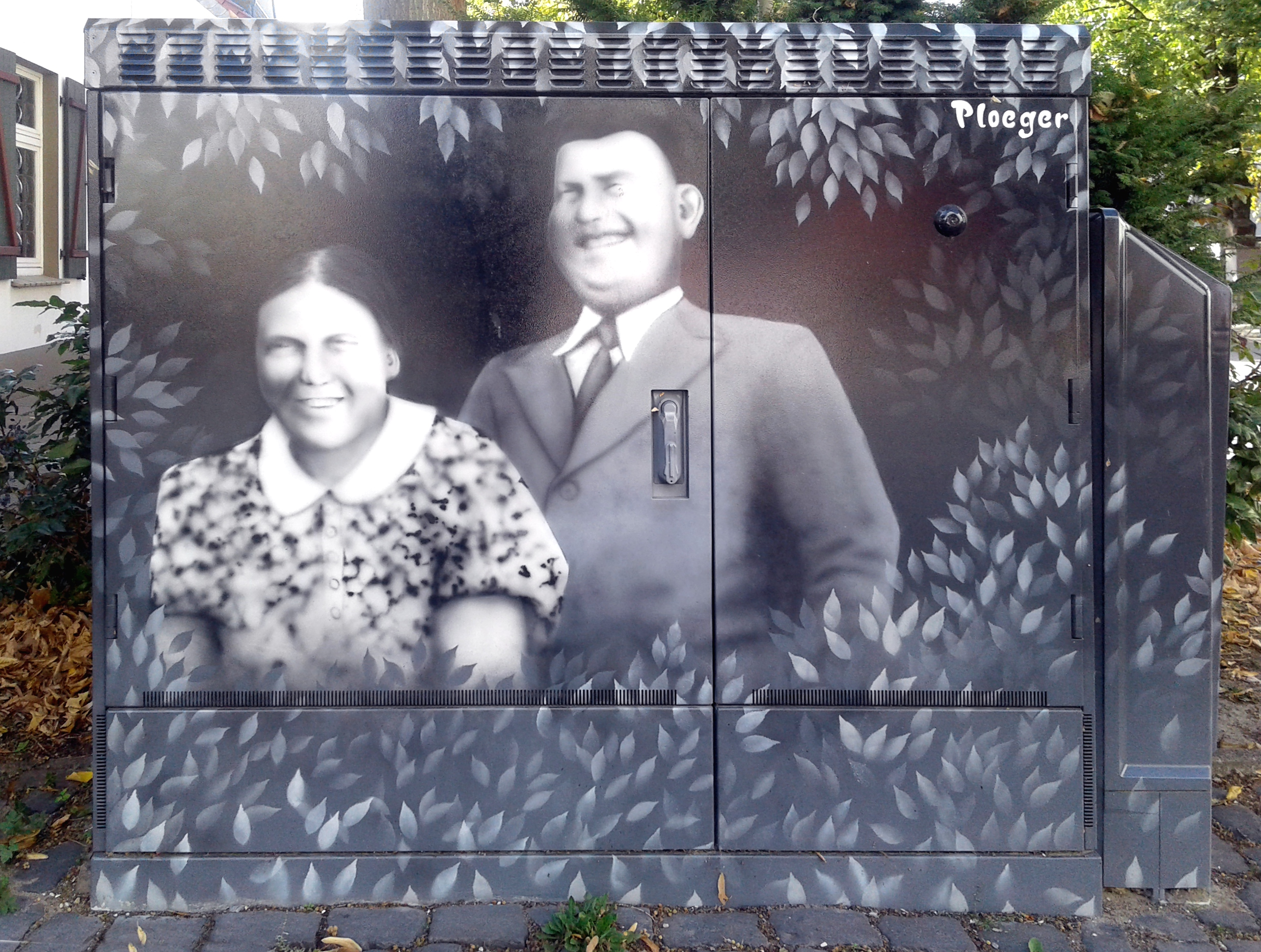 Bemalter Stromkasten im öffentlichen Raum in der Herforder Altstadt